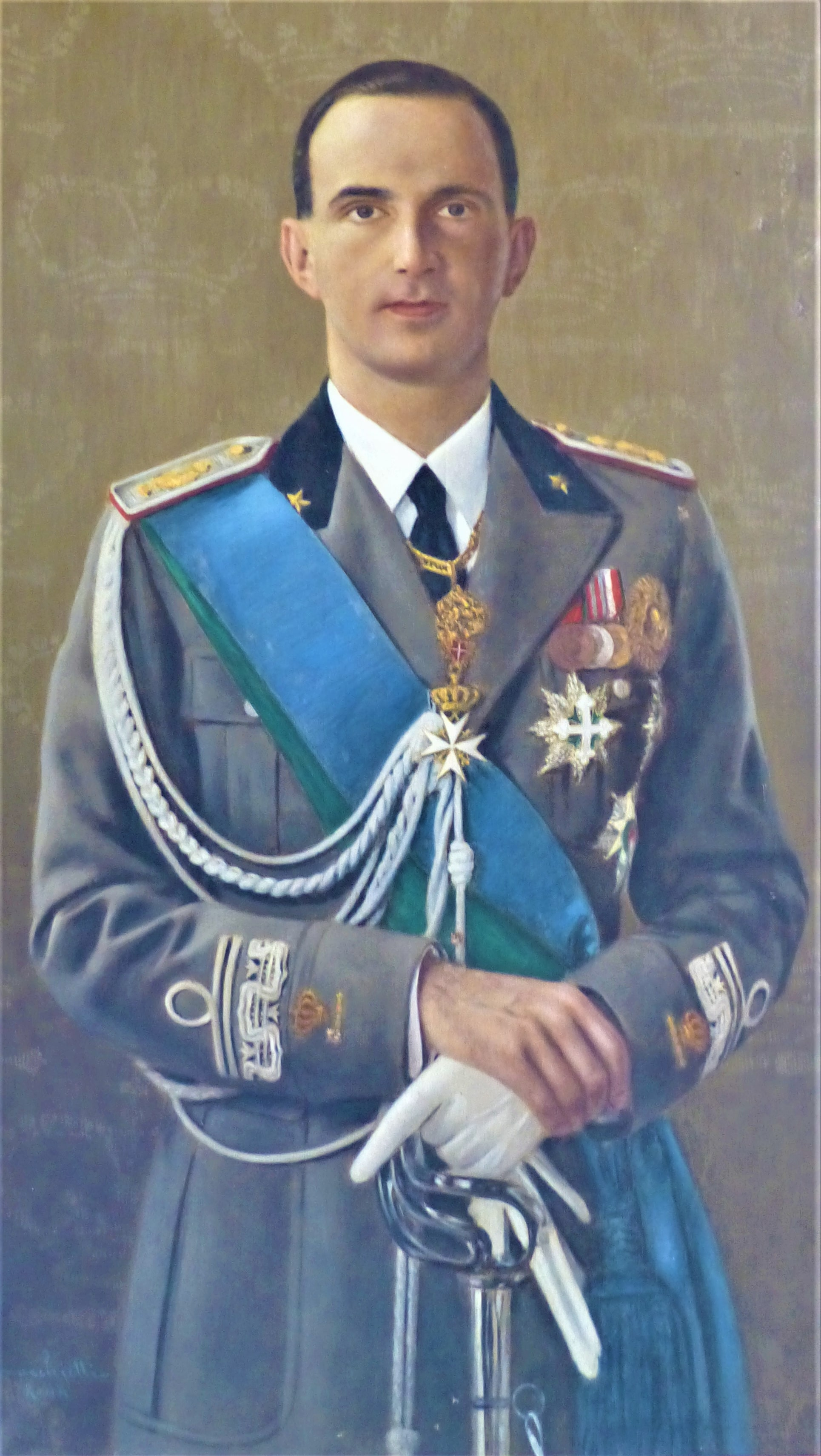 Portrait d'Umberto II, dernier roi d'Italie, mort en 1983, situé dans les appartements privés du roi Charles-Félix de Savoie et de Marie-Christine de Bourbons-Sicile à l'abbaye d'Hautecombe